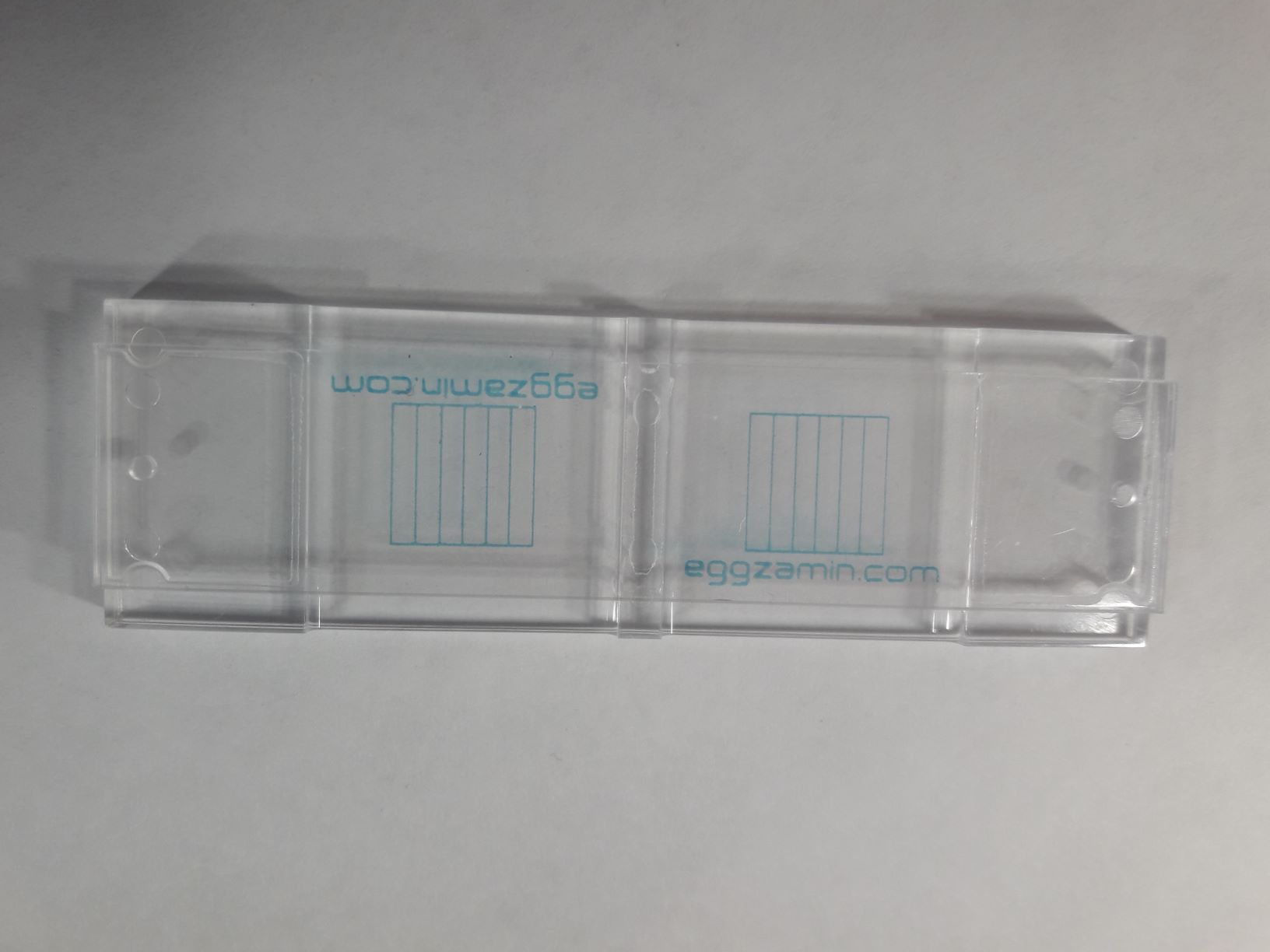 Lugemiskambrit kasutatakse helmindimunade loendamisel